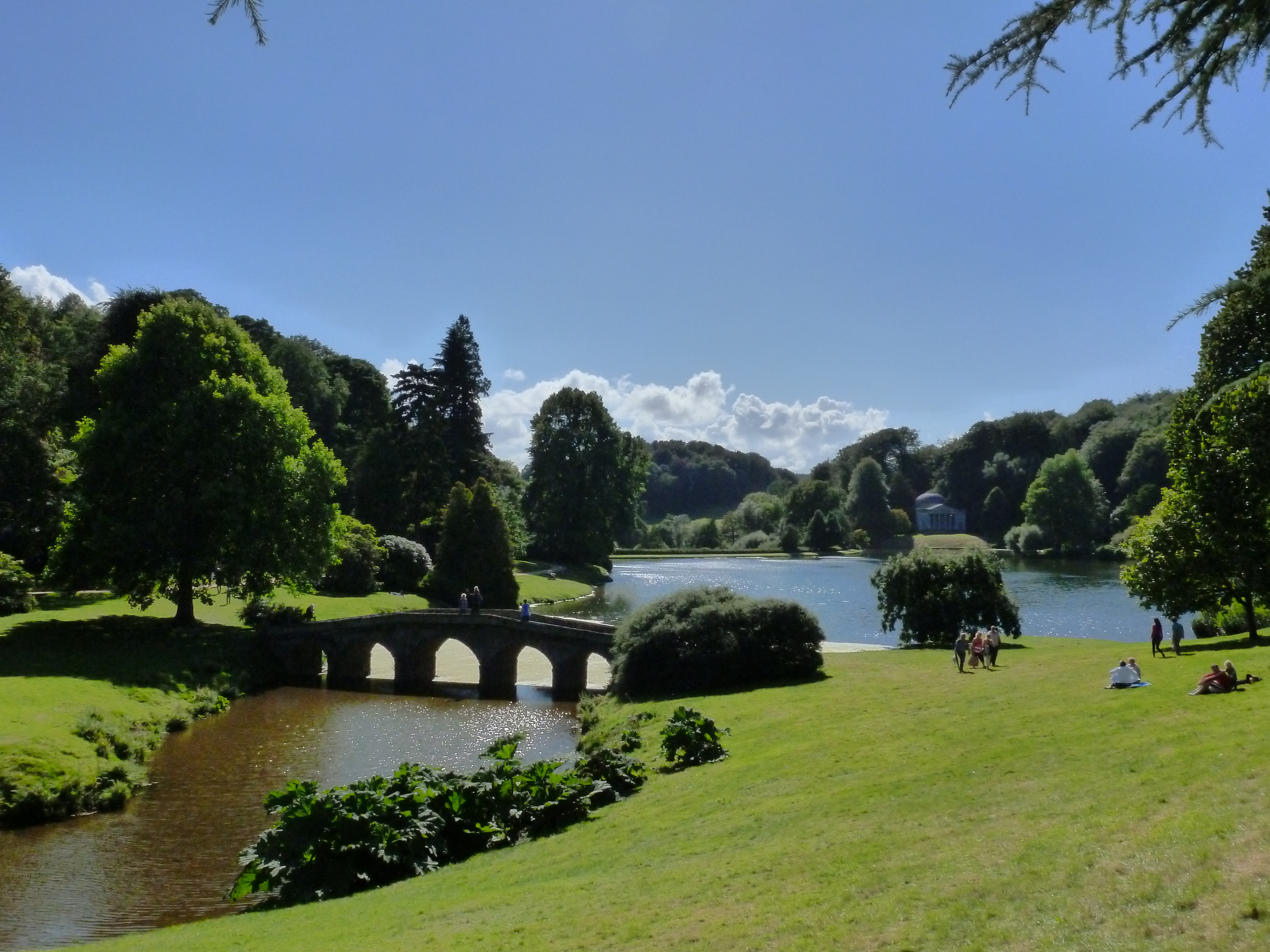 Stourhead lake in midsummer